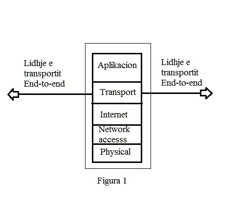 Firewalli për filtrimin e paketave